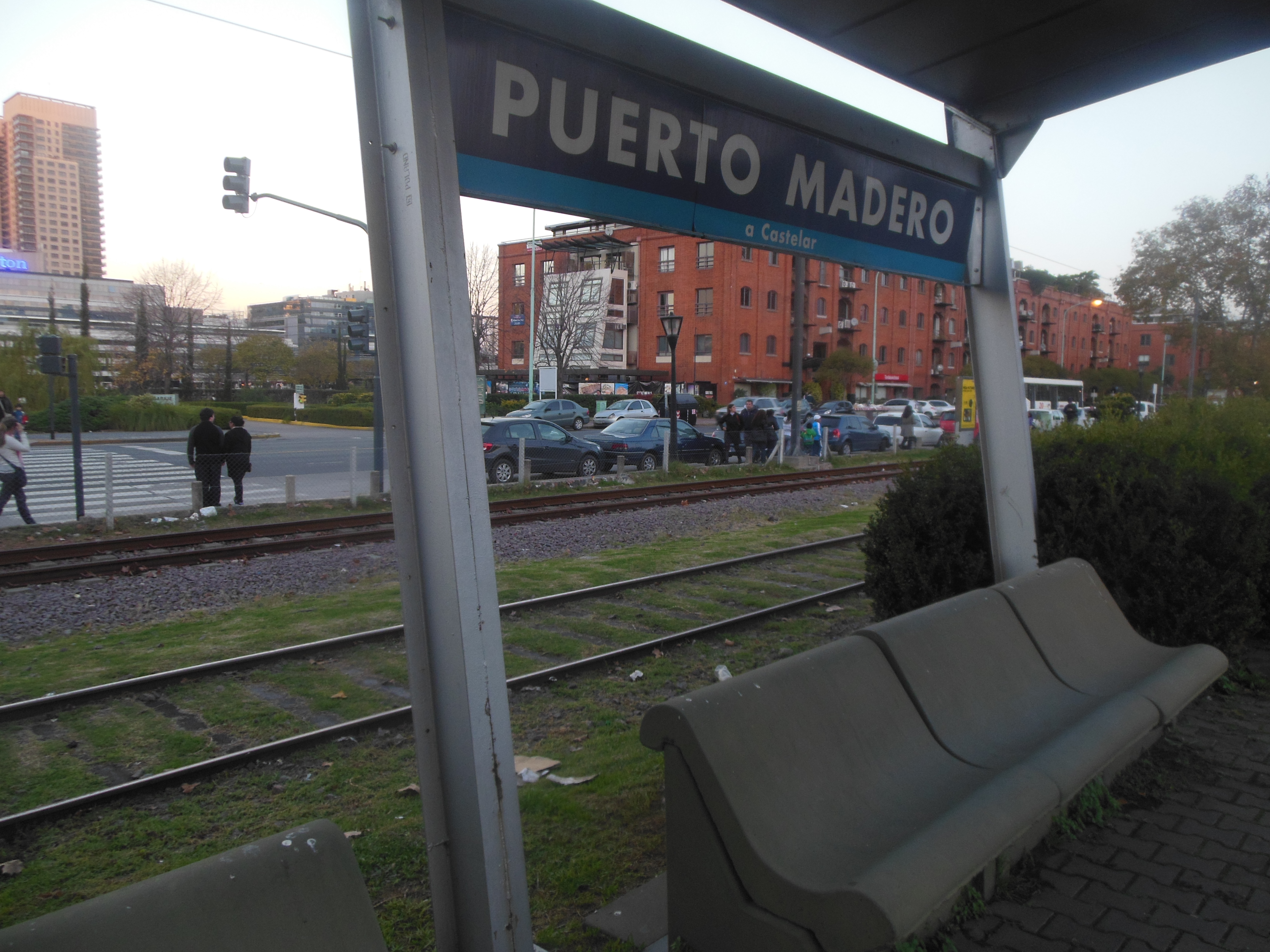 Nomenclador